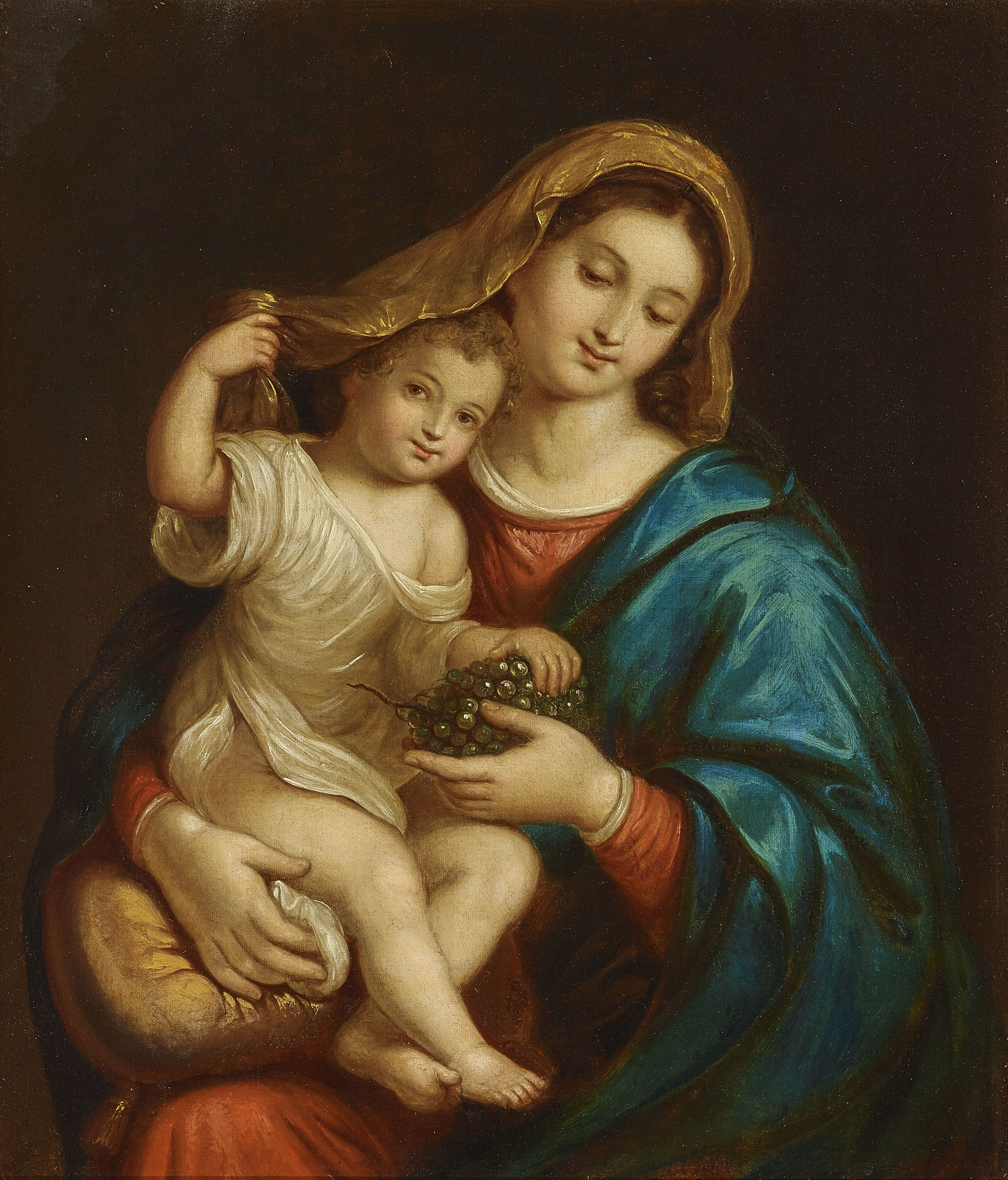 "Madonna col Bambino", olio su tela, 57 x 49 cm, firmato